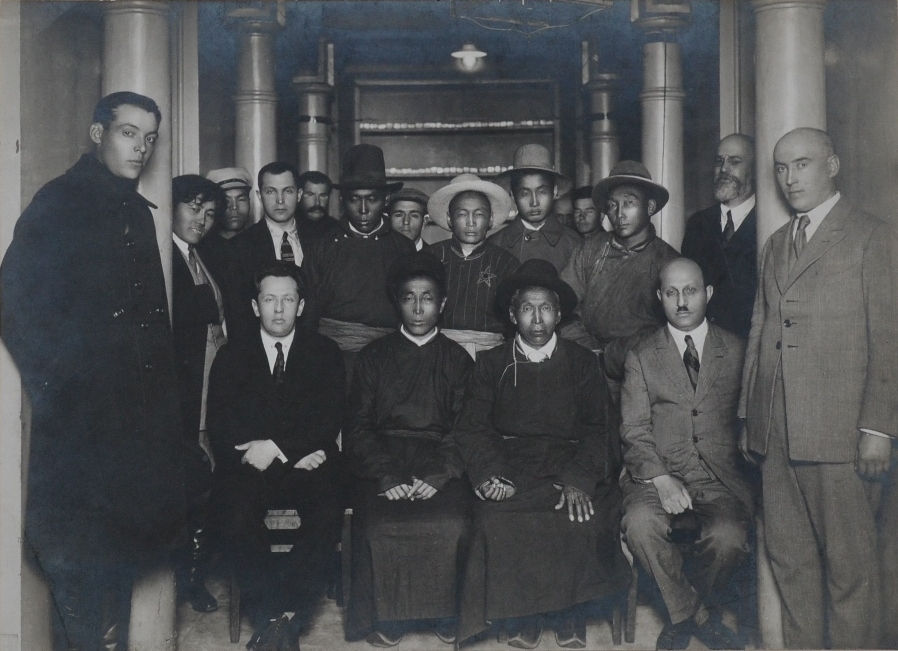 Первая официальная Тувинская делегация в Москве: Подписание договора о дружбе и сотрудничестве между Танну Тувой и СССР. Москва, фотография ВЦИК, 1925.